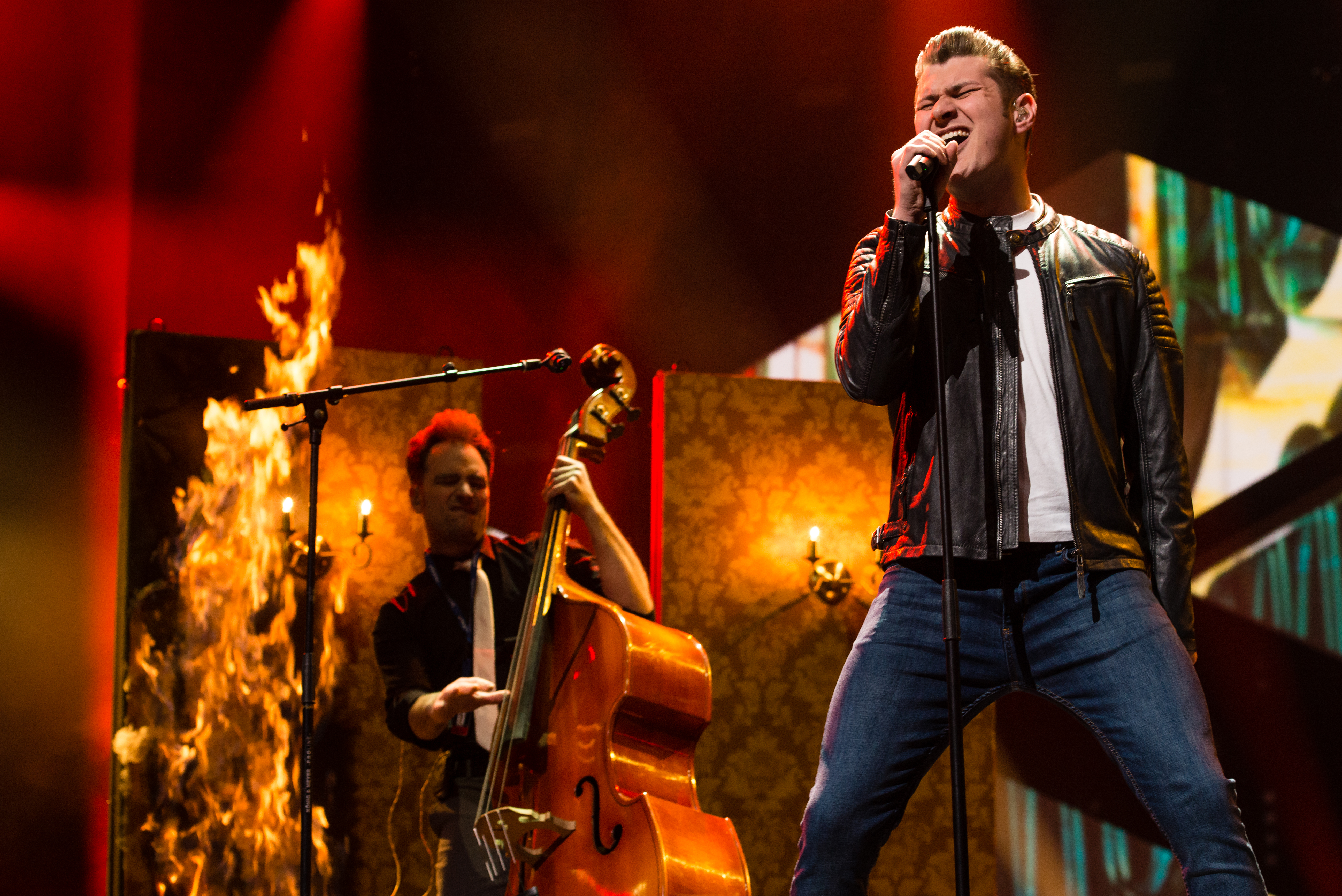 'Eurovision Song Contest 2014 - Unser Song für Dänemark': 'The Baseballs'